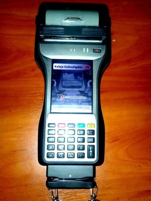 Terminal mobilny Casio IT-9000 z oprogramowaniem dla drużyn konduktorskich spółki Koleje Dolnośląskie